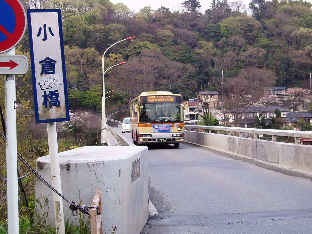 Kanachu Sa0104（さ0104） Mitsubishi KK-MK23HJ at Ogura Bridge